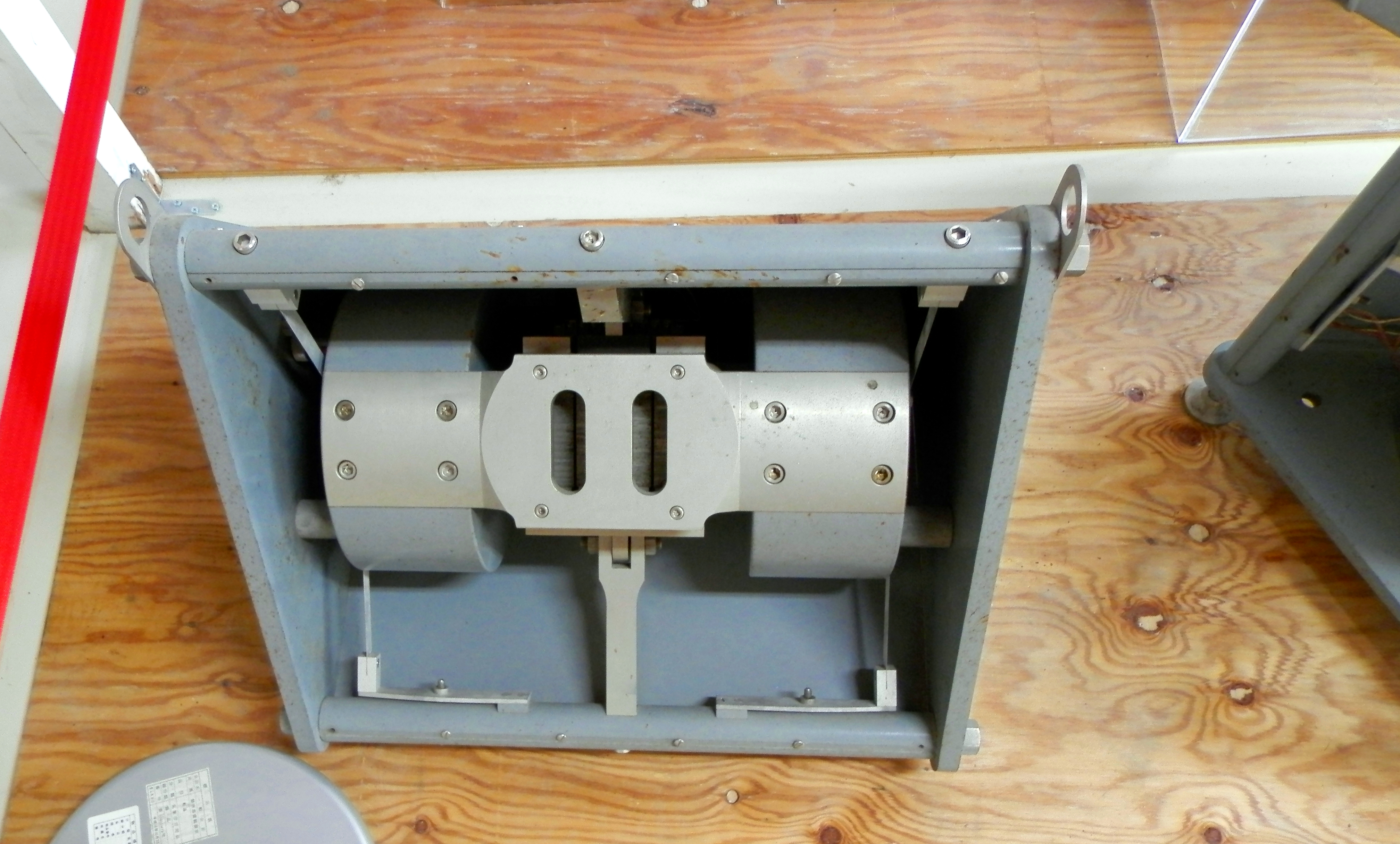 ベニオフ式短周期地震計、松代地震観測所資料室展示品